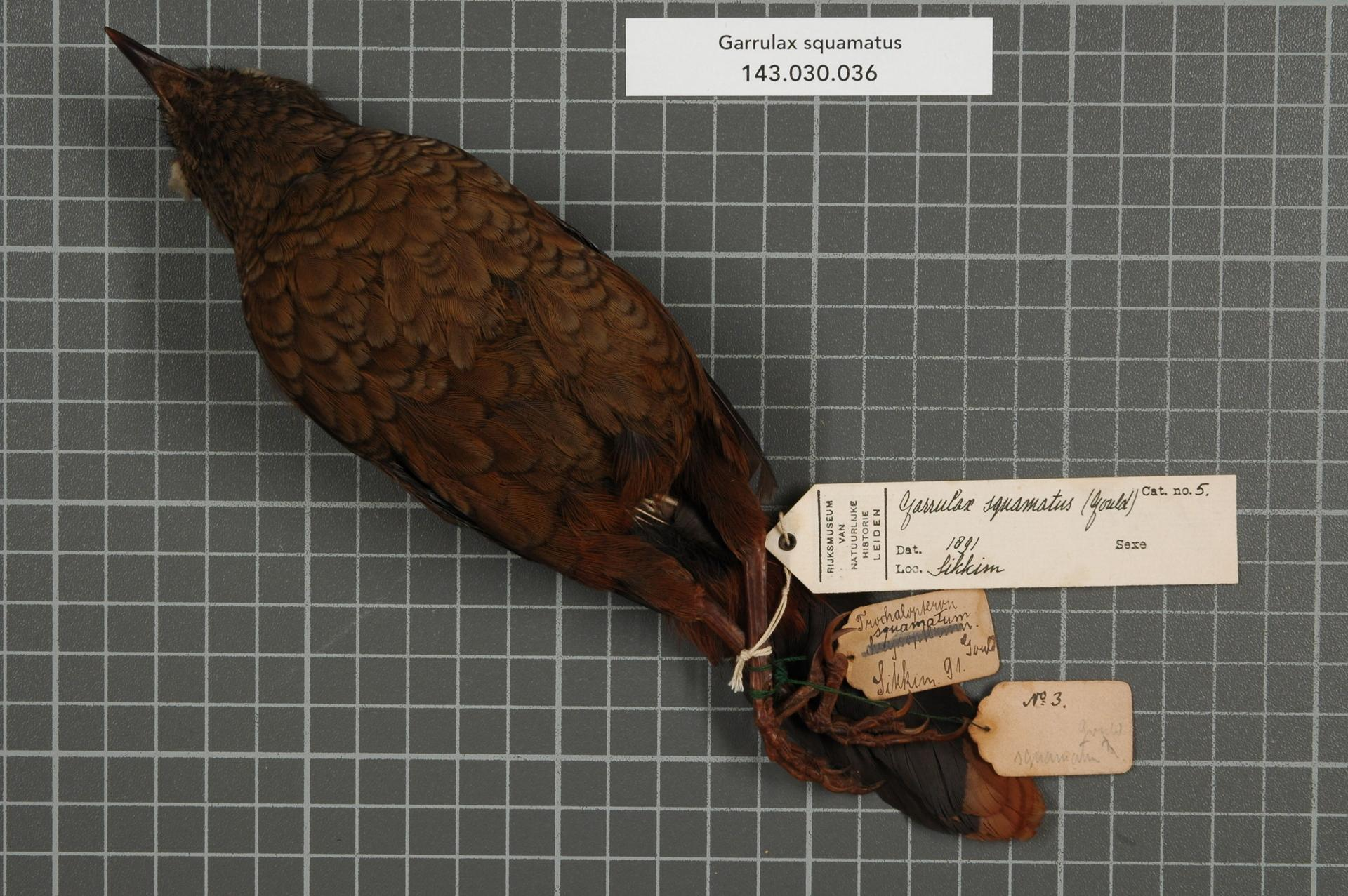 Garrulax squamatus (Gould, 1835)